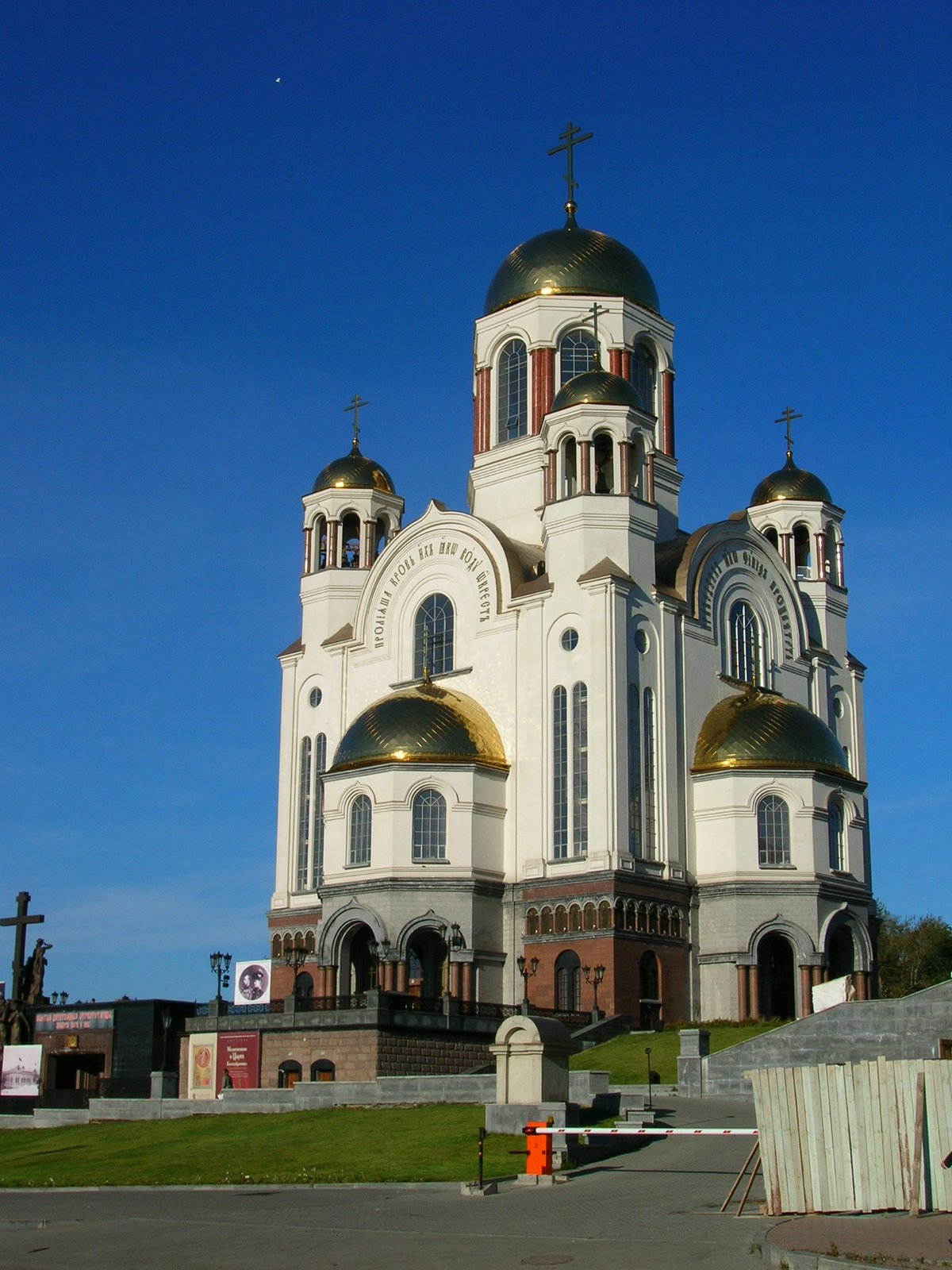 Храм на крови в Екатеринбурге